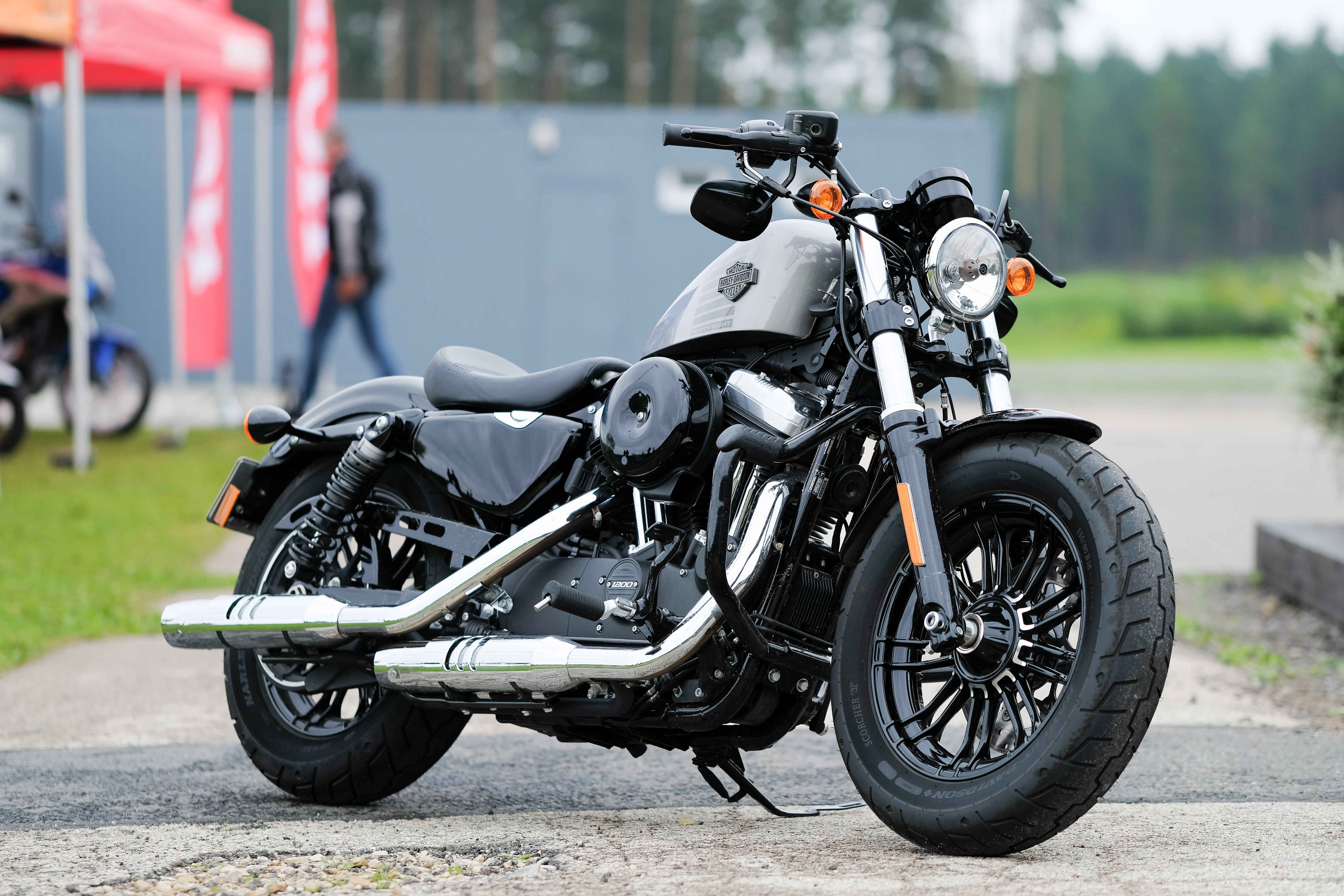 Fujifilm X-T2 sample photo